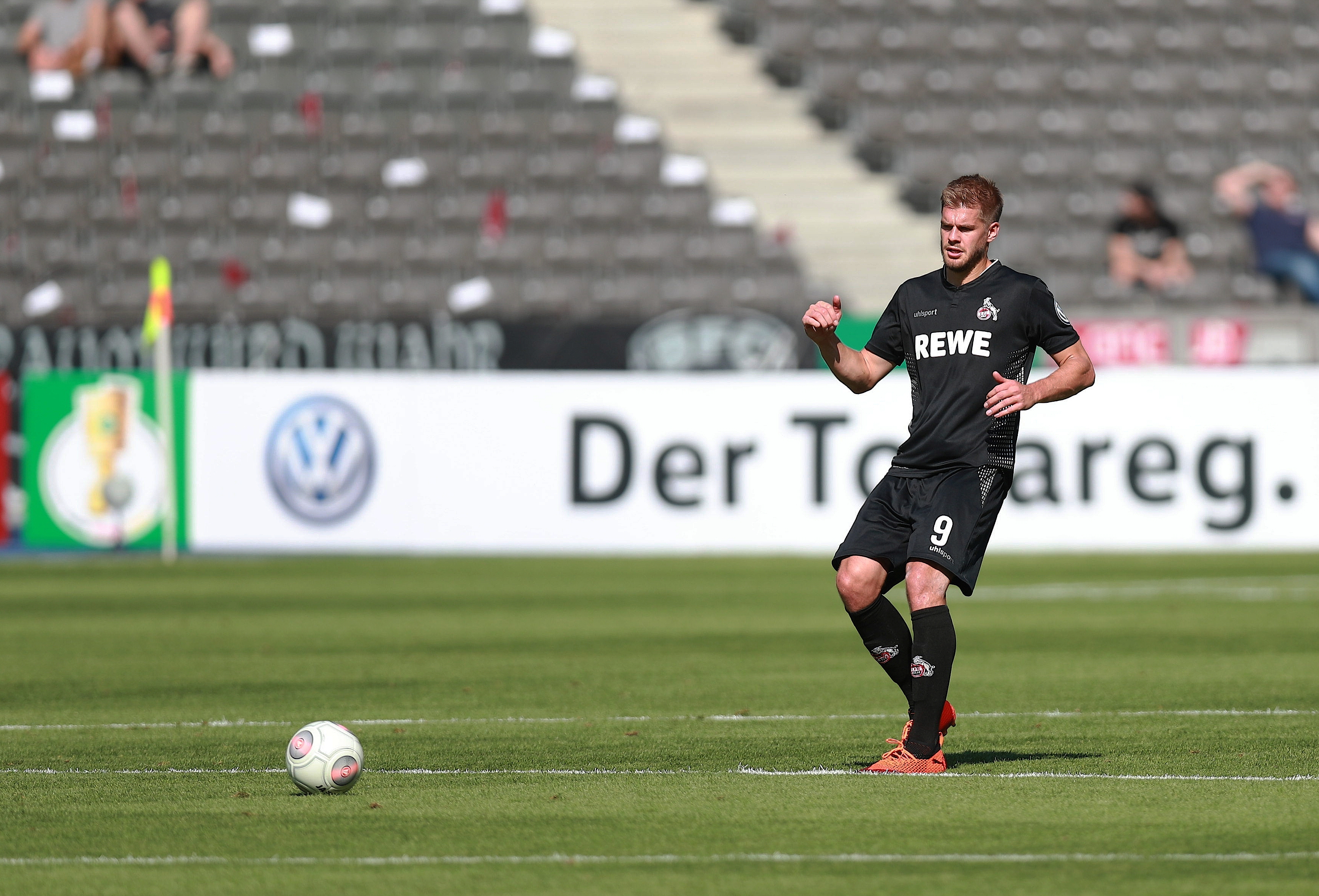 DFB-Pokal 2018/19, 1. Hauptrunde: BFC Dynamo gegen 1. FC Köln 1:9 (1:4)